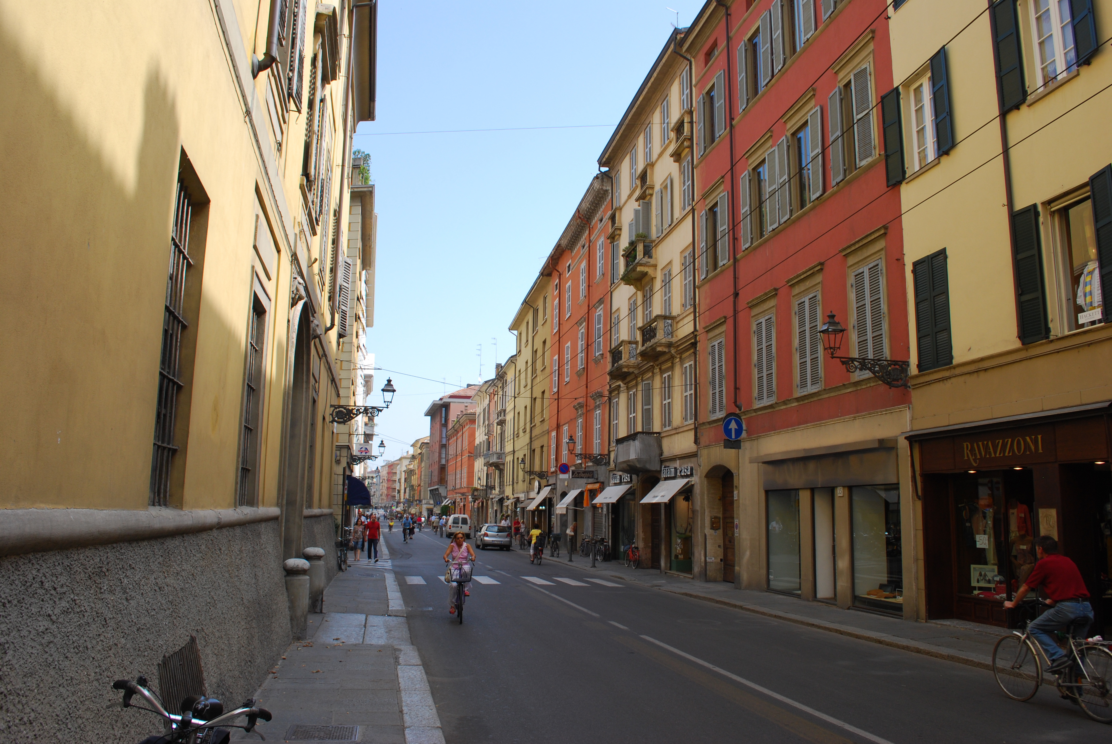 La rue Giuseppe Garibaldi à Parme.